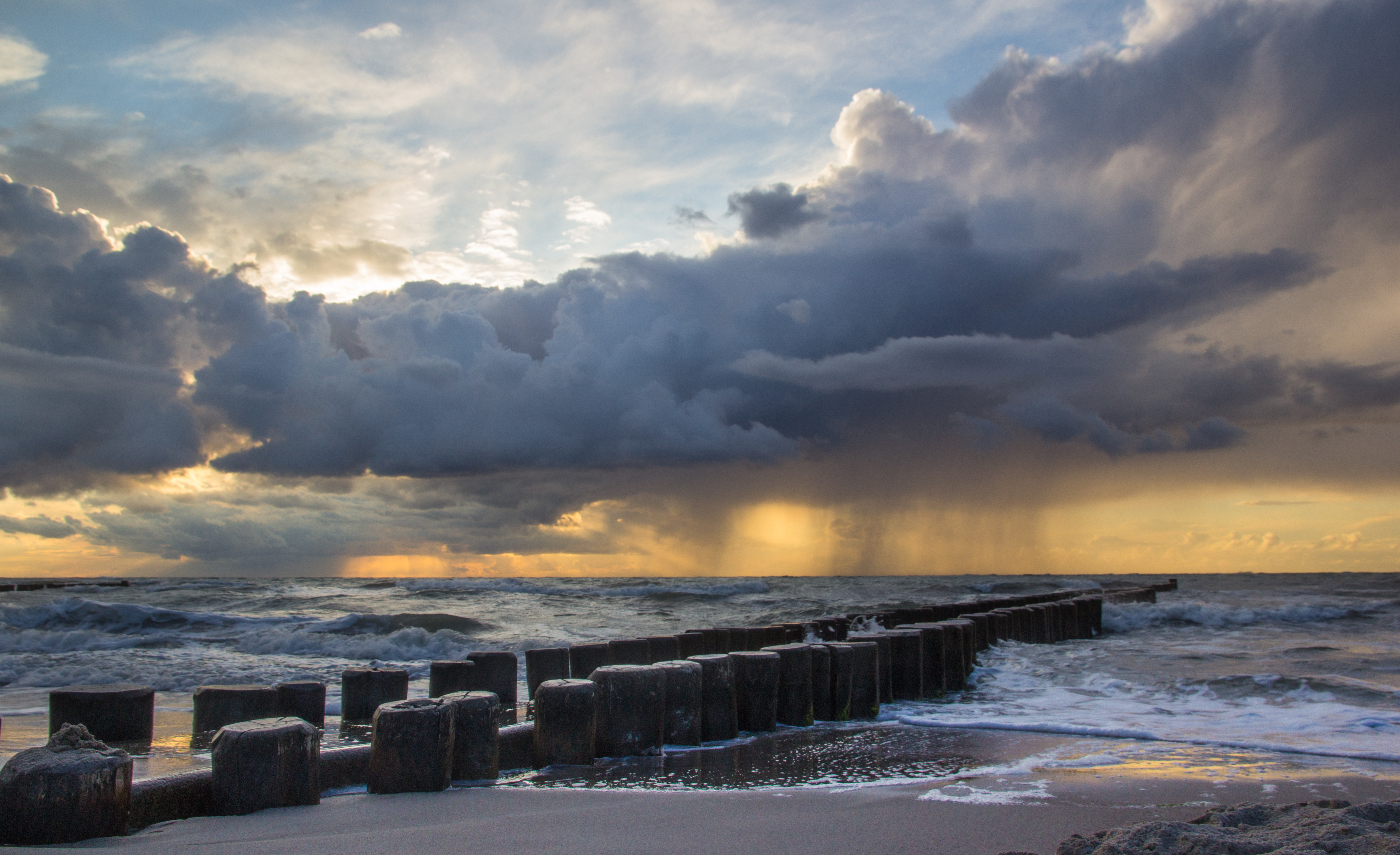 Diese farbenprächtige Regenfront konnte man am Wochenende am Strand von Ahrenshoop bewundern.